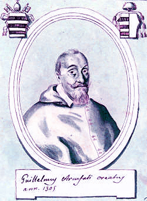 Cardinal Guillaume des Forges